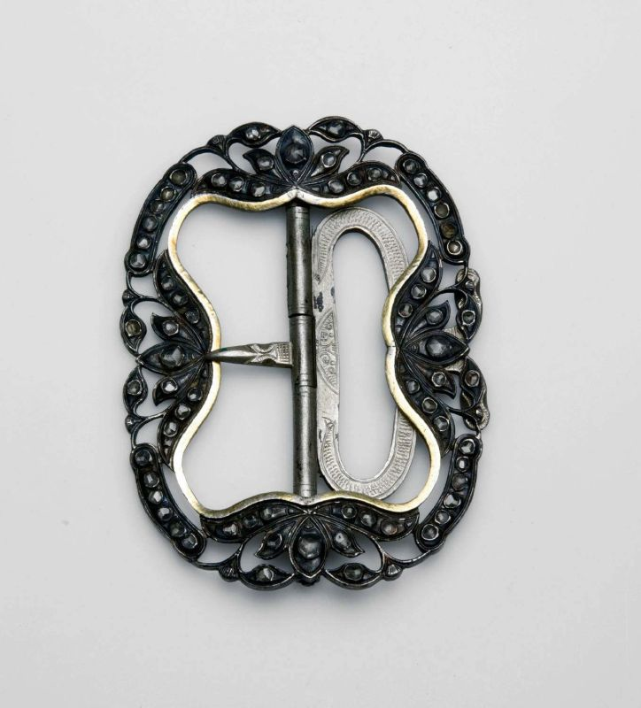 Gesp. Brede gesp vormt een stel met smalle gesp 1772-475b. De brede gesp wordt voor de buik gedragen en de smalle opzij aan de band.. Brede zilveren gesp met glasdiamantjes, behorend bij smalle gelijkvormige gesp